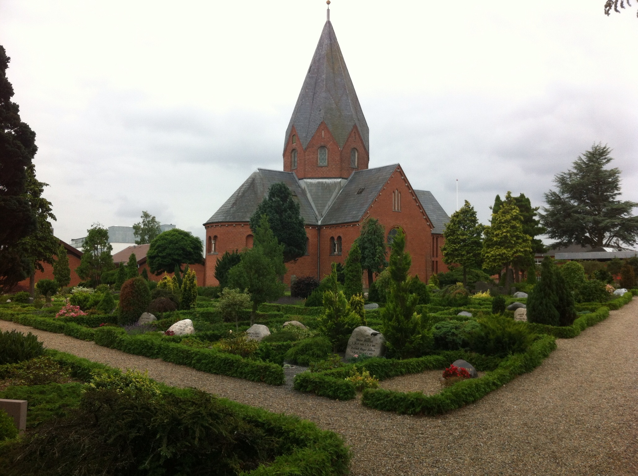 Hadsund Kirkegård med kirken i midten.